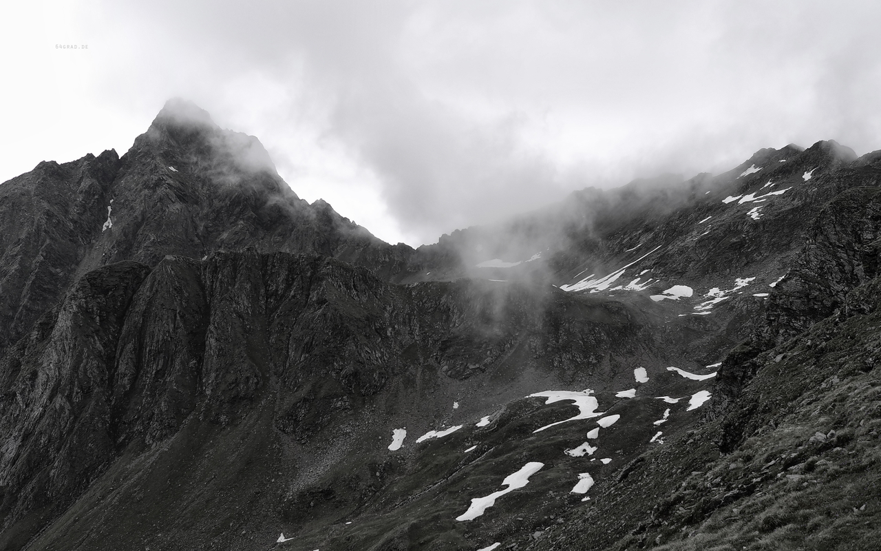 Großer Zunig Nordseite in Matrei, Osttirol